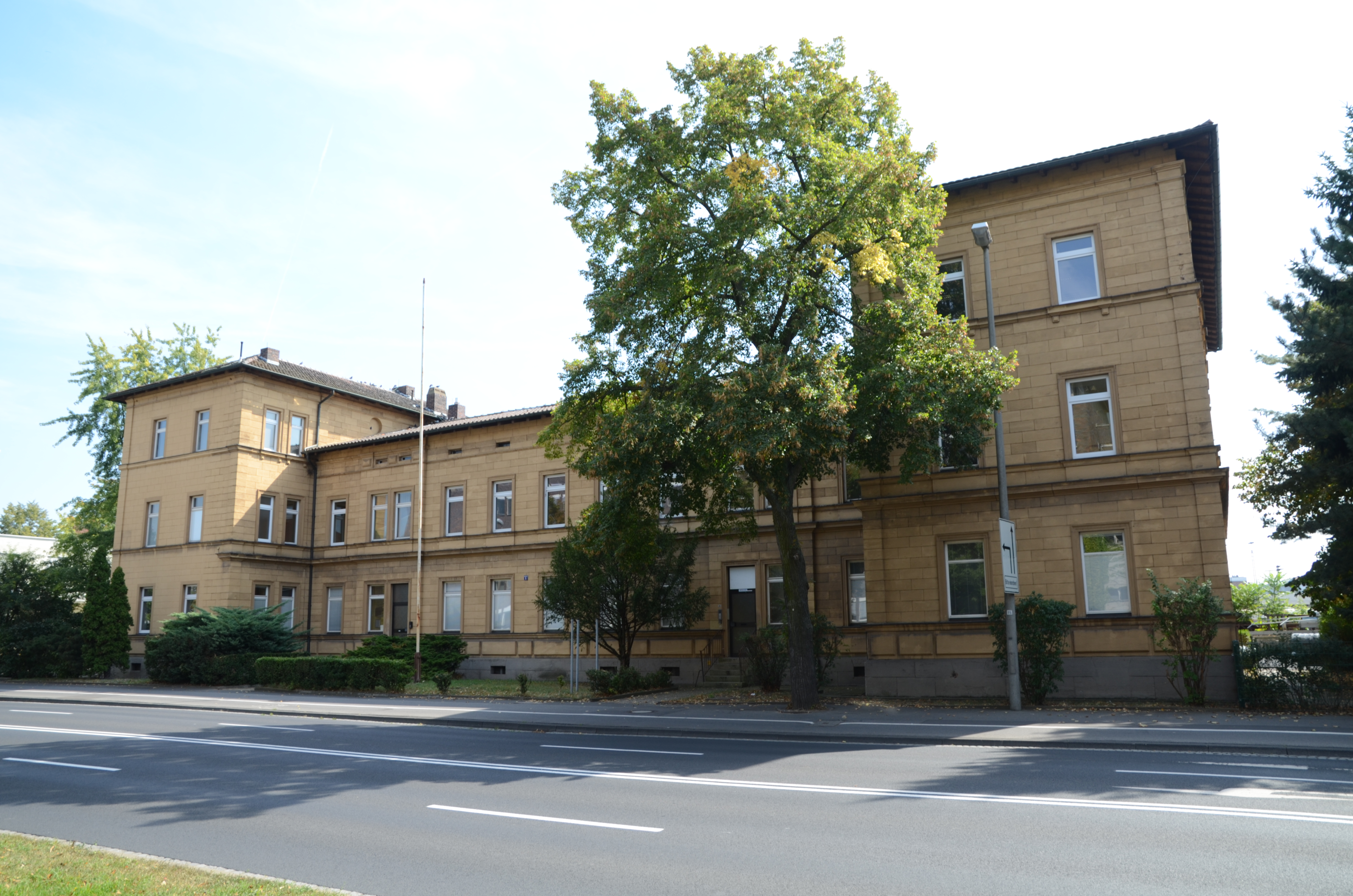 Schweinfurt Hauptbahnhofstraße 1